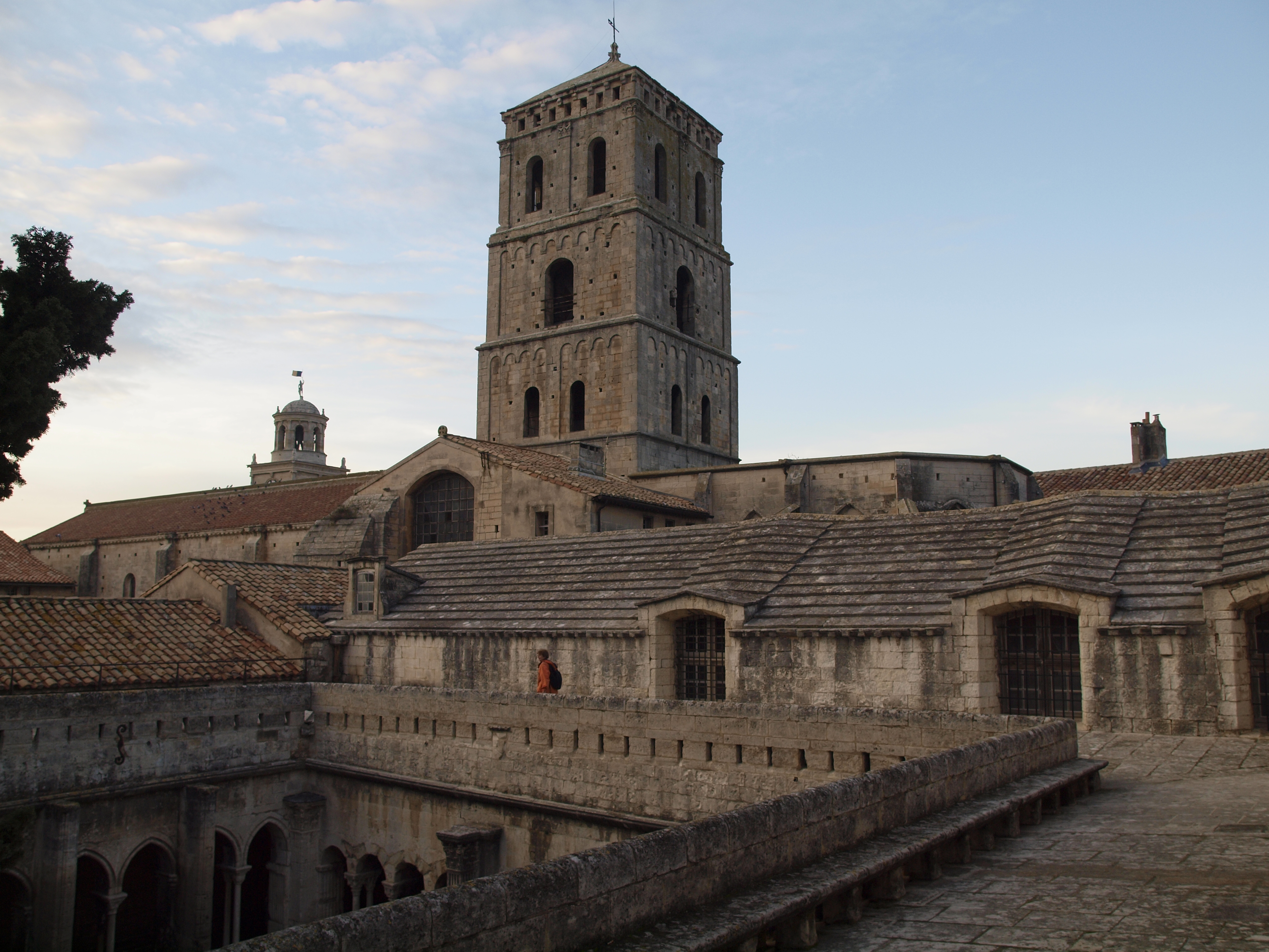 Der Kreuzgang der ehm. Kloster/Kathedrale St.-Trophime in Arles